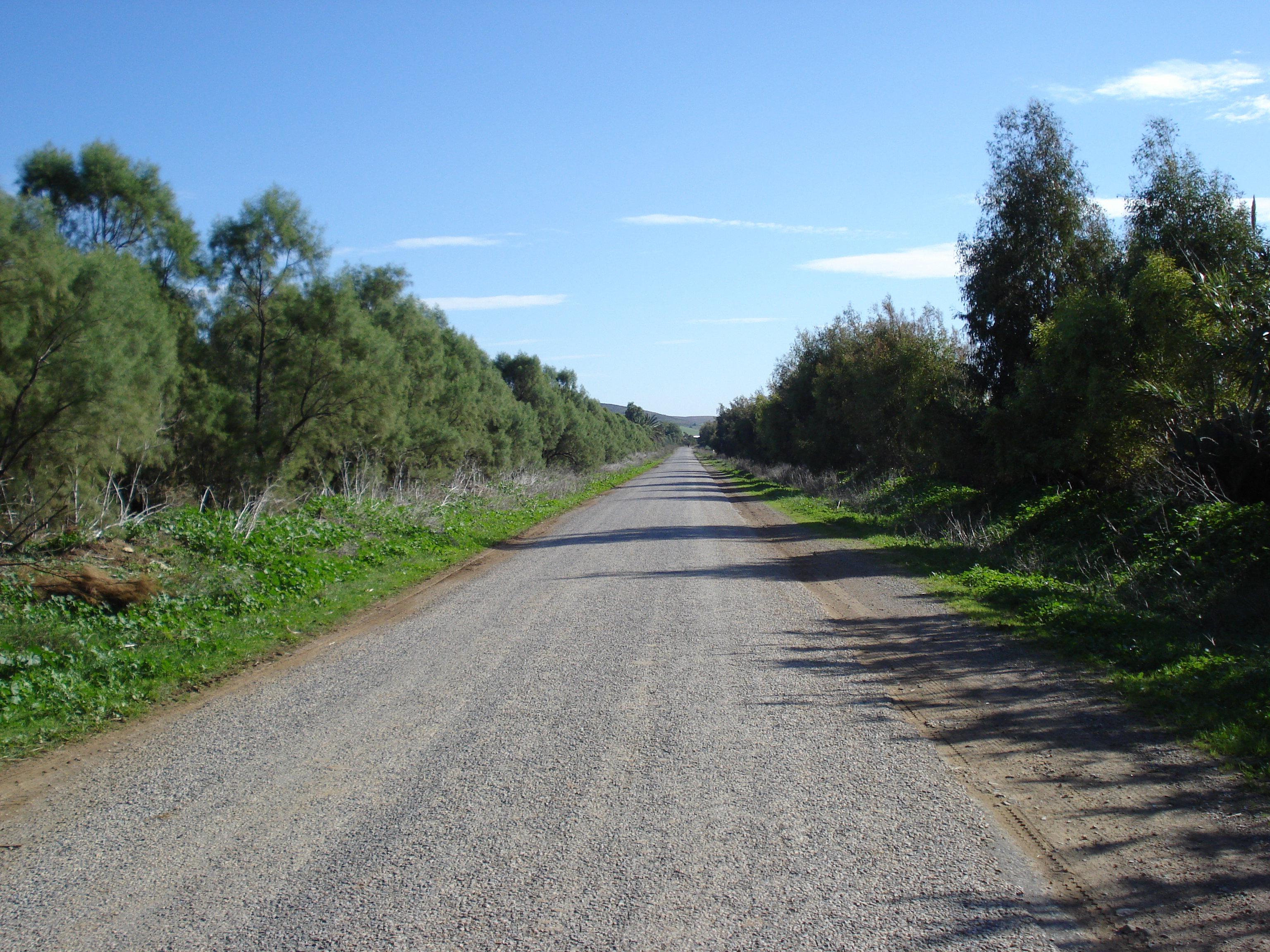 Route locale 300, Tunisie